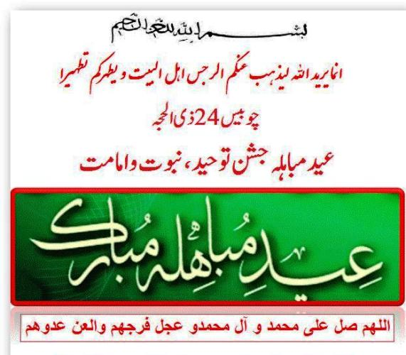 عید مباہلہ کا ایک فارسی میں چھپا ہوا اشتہار